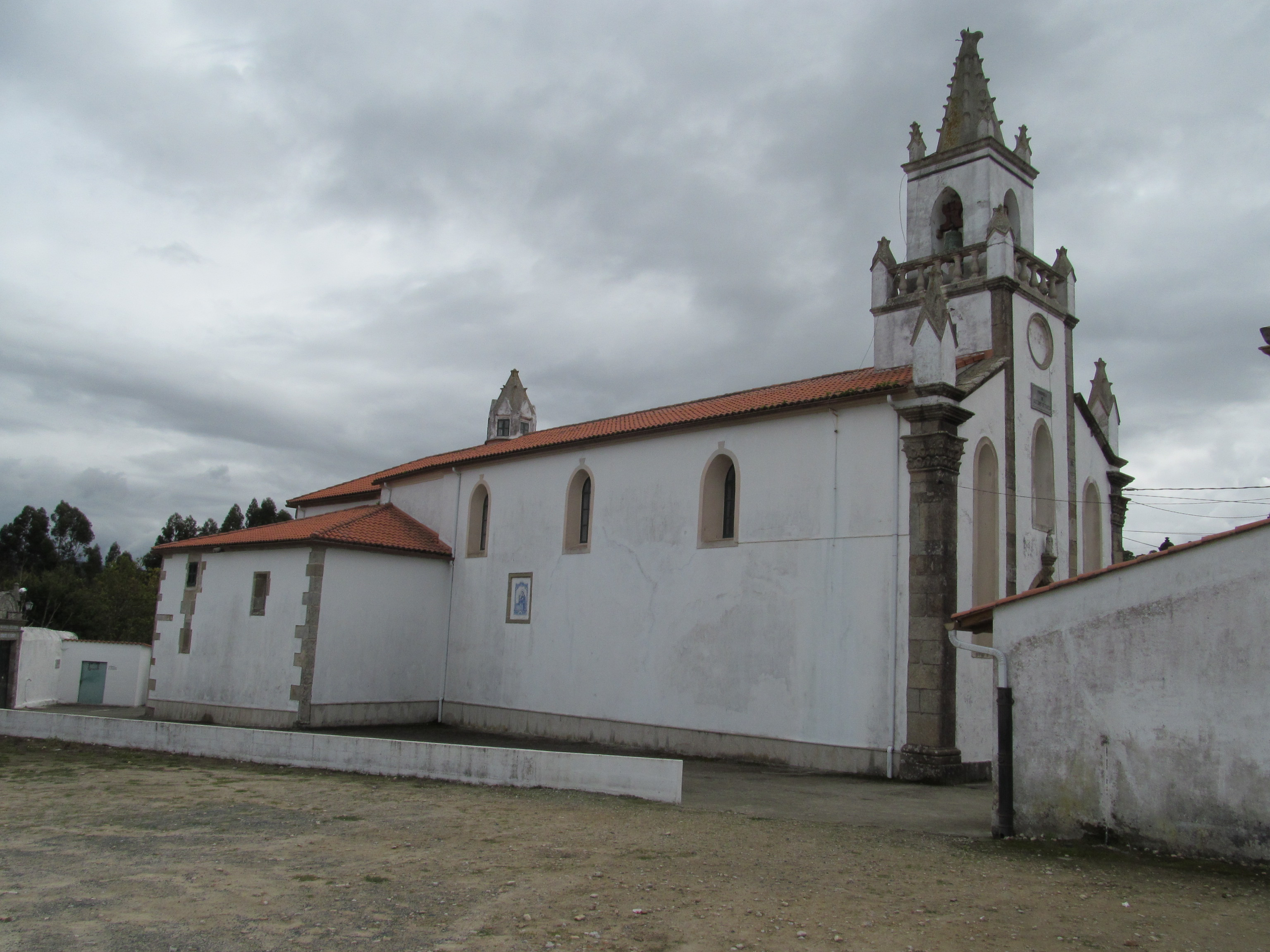 Iglesia parroquial de Santiago de Franza, en Mugardos, Galicia (España).